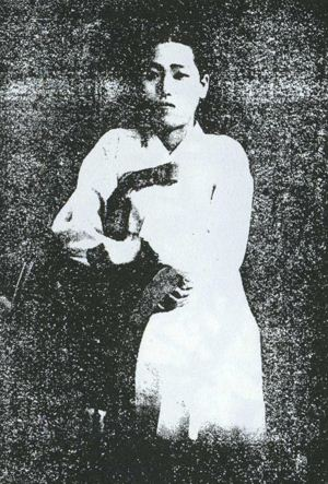 수원 3.1운동때 김향화